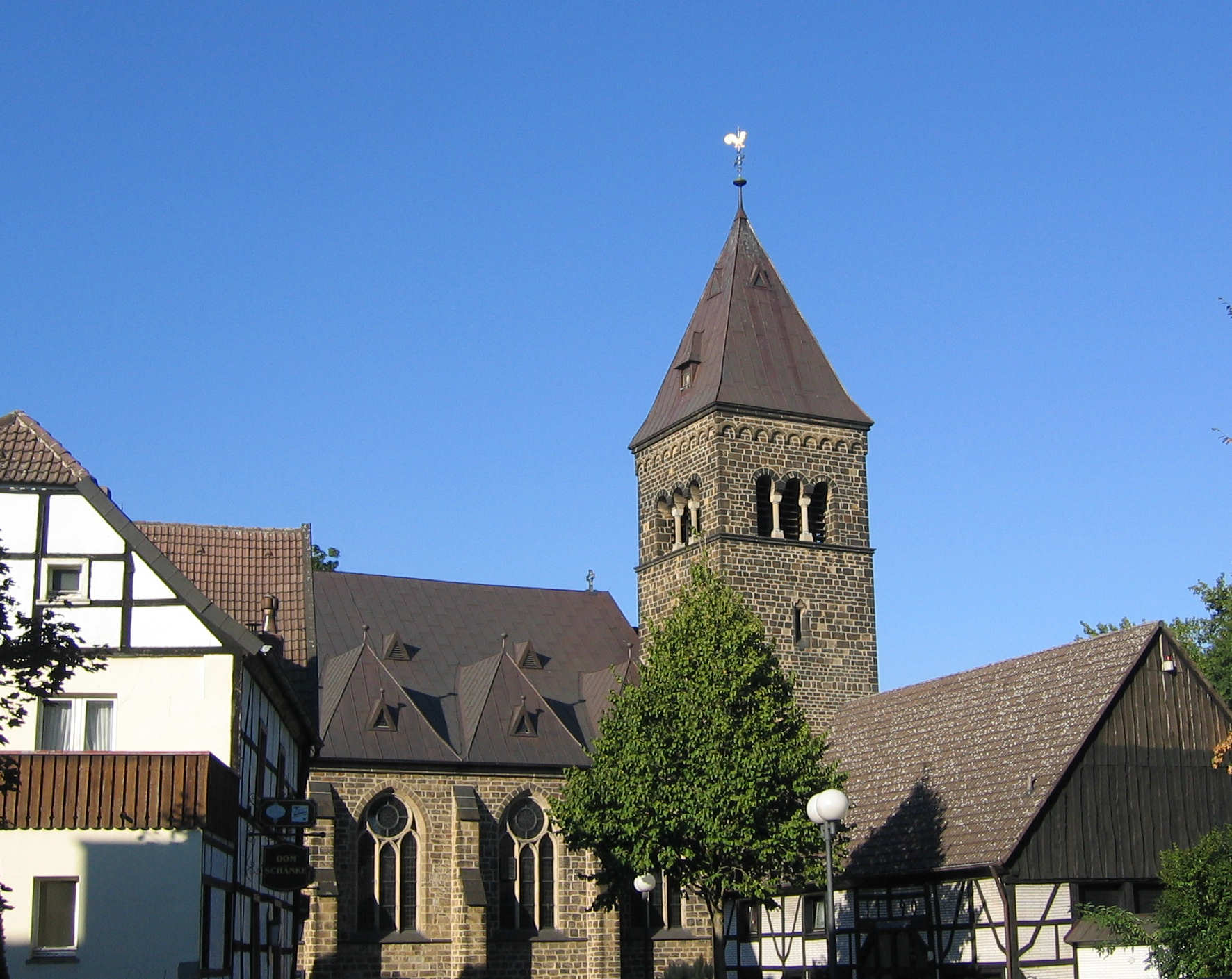 Alte Kirche Dortmund Huckarde (Urbanuskirche) Eigene Aufnahme September 2006